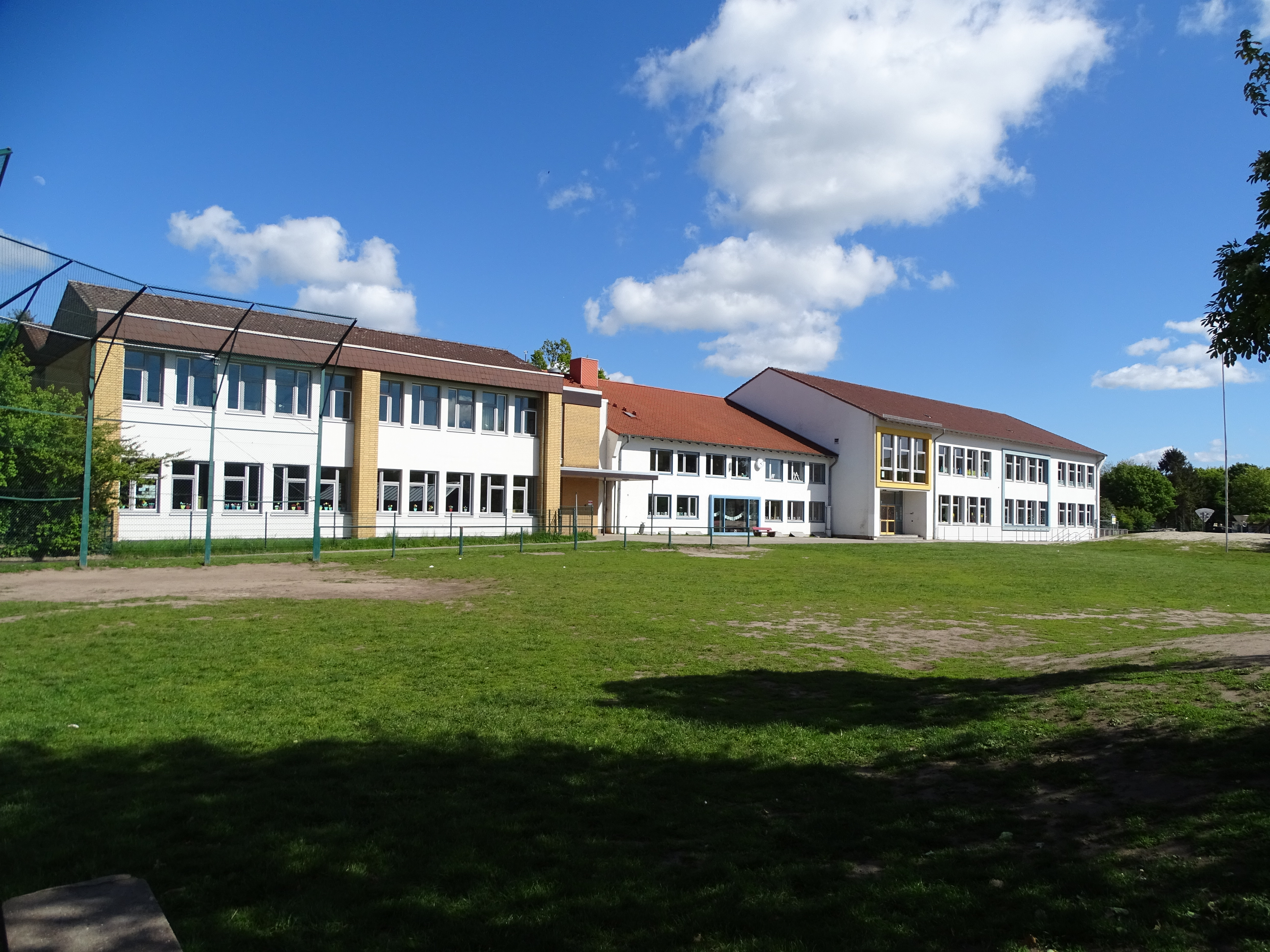 Amerikanische Schule in Bremerhaven-Lehe-Nord